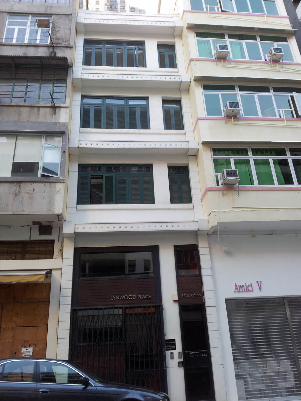 64 Staunton Street, Sheung Wan